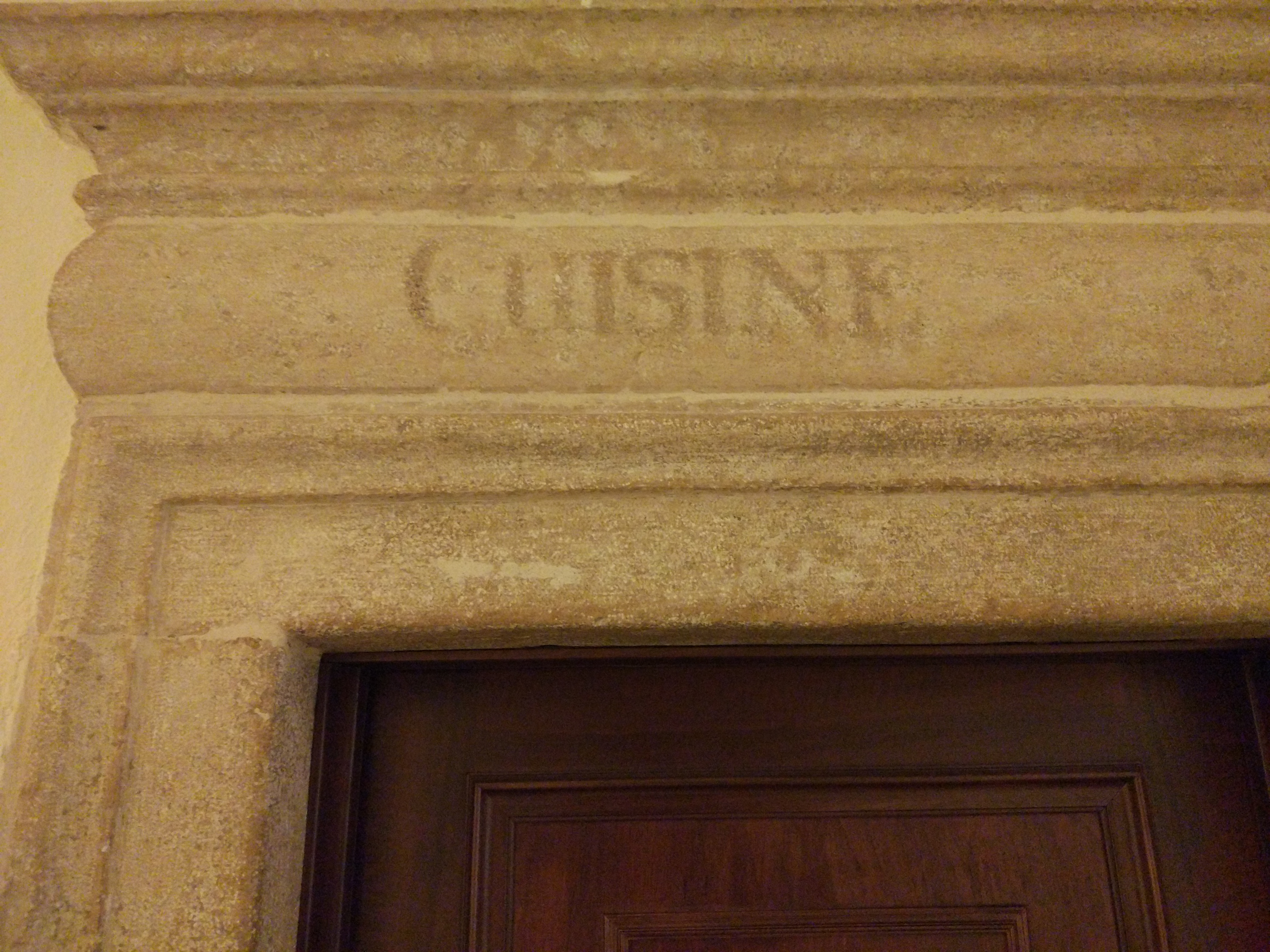 Scritta in francese su stipite della porta